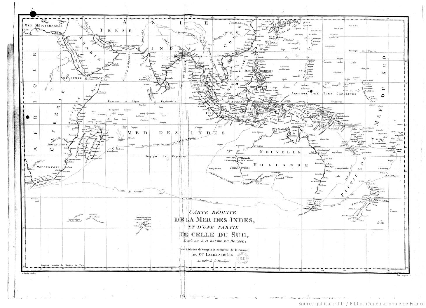 Carte du trajet suivi par l'expédition d'Entrecasteaux (1791-1794) envoyée à la recherche de La Pérouse